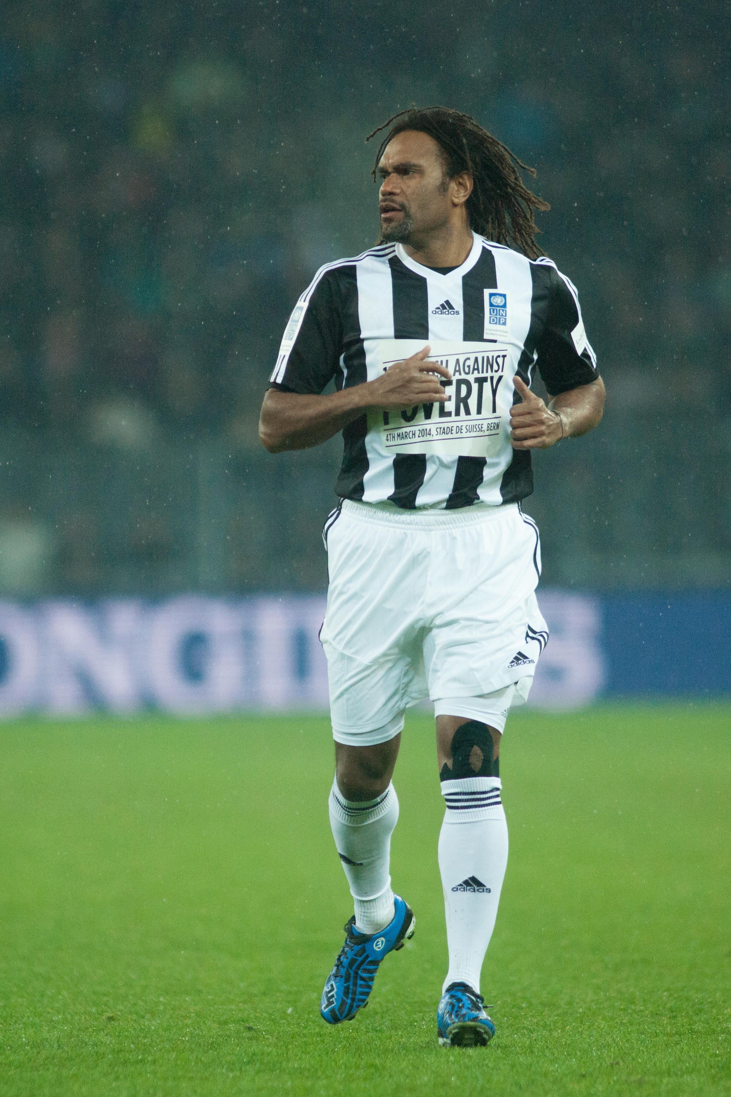 Football against poverty 2014 - Christian Karembeu